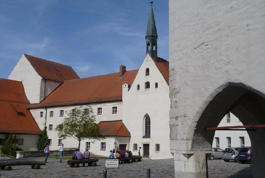 Schlossplatz Straubing